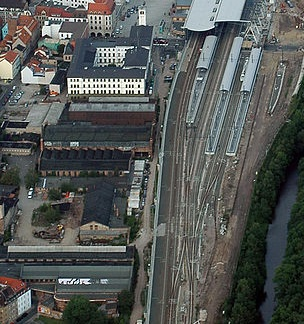 Ehem. Bahnbetriebswerk Erfurt